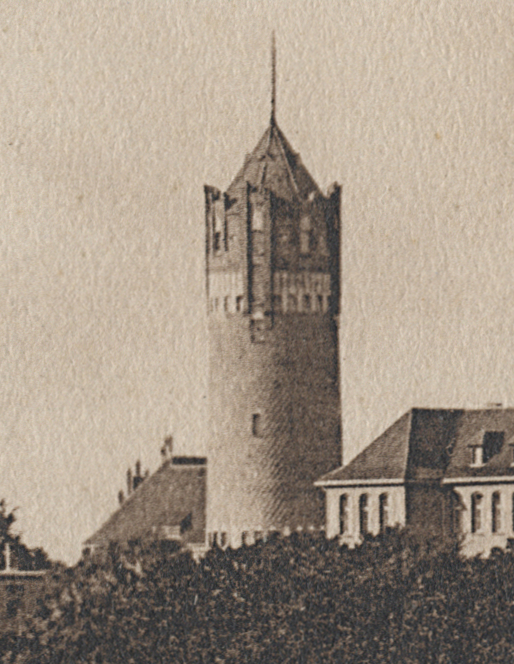 Mürwiker Burg um 1910, geerbt